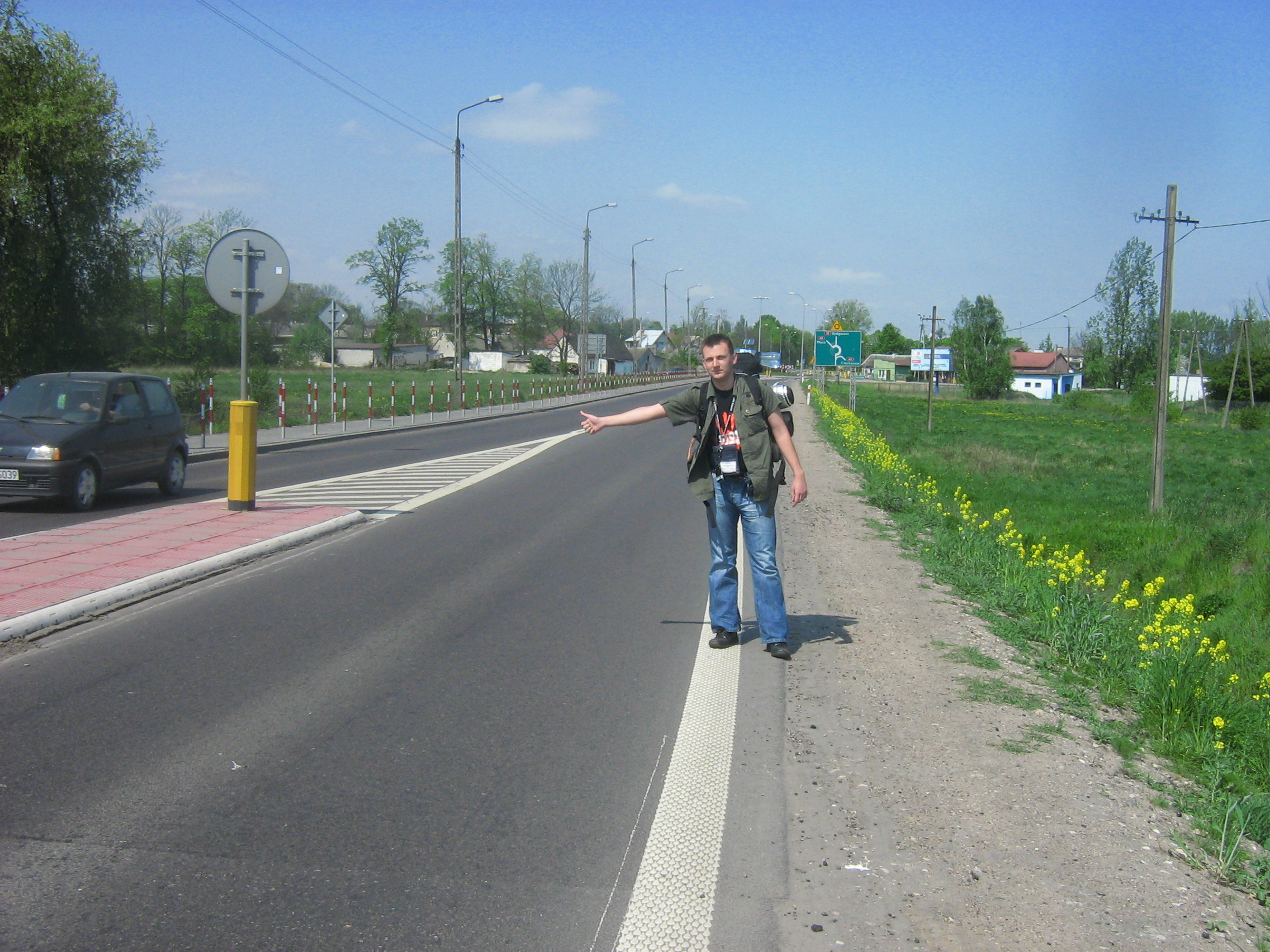 Międzynarodowe Mistrzostwa Autostopowe Sopot - Lwów; Drobin - droga krajowa nr 10 przed rondem stanowiącym skrzyżowanie z drogą krajową nr 60